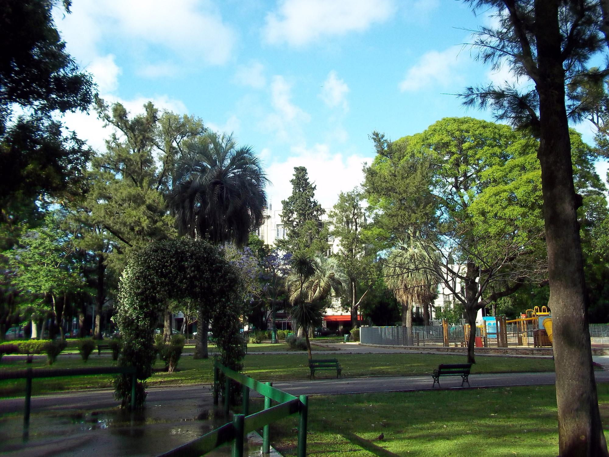 Vista parcial de la plaza Castelli, en la ciudad de Buenos Aires.